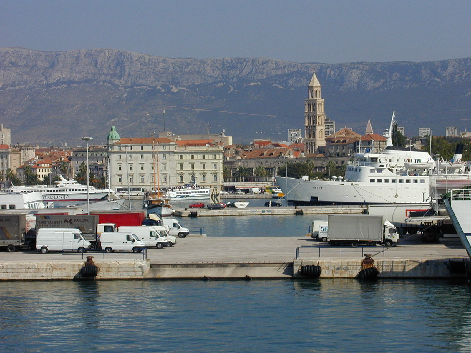 Hafen von Split (2002) Das Bild wurde von mir persönlich am 31.08.2002 in Split, Kroatien, aufgenommen. Henning 21:23, 11. Apr 2004 (CEST)